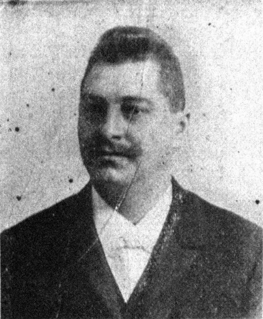 Österreichischer Politiker, Reichsratswahl 1907, Name siehe Dateiname